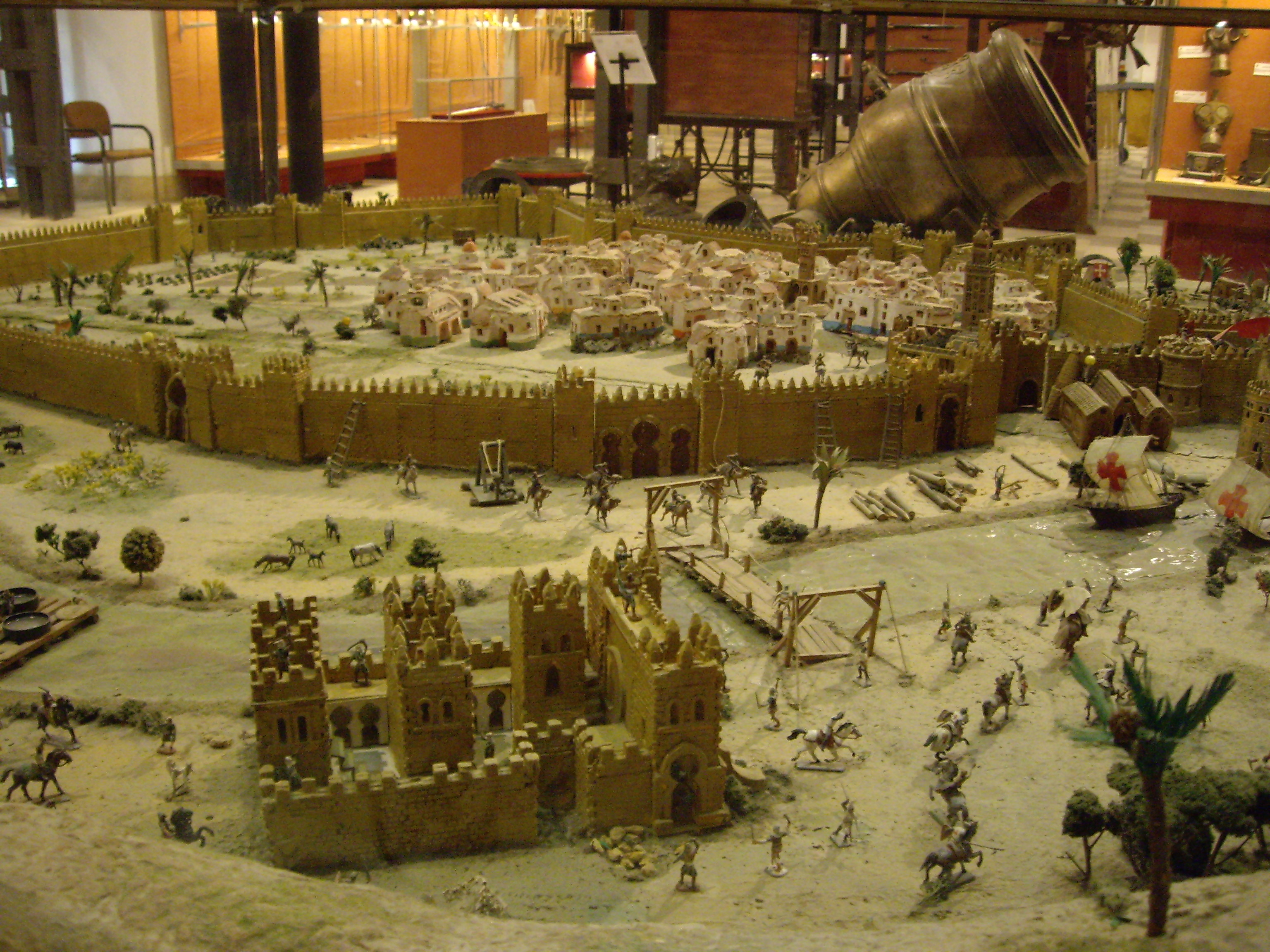 Reconquista de Sevilla desde el Oeste en una maqueta del Museo Histórico Militar de Sevilla, en España